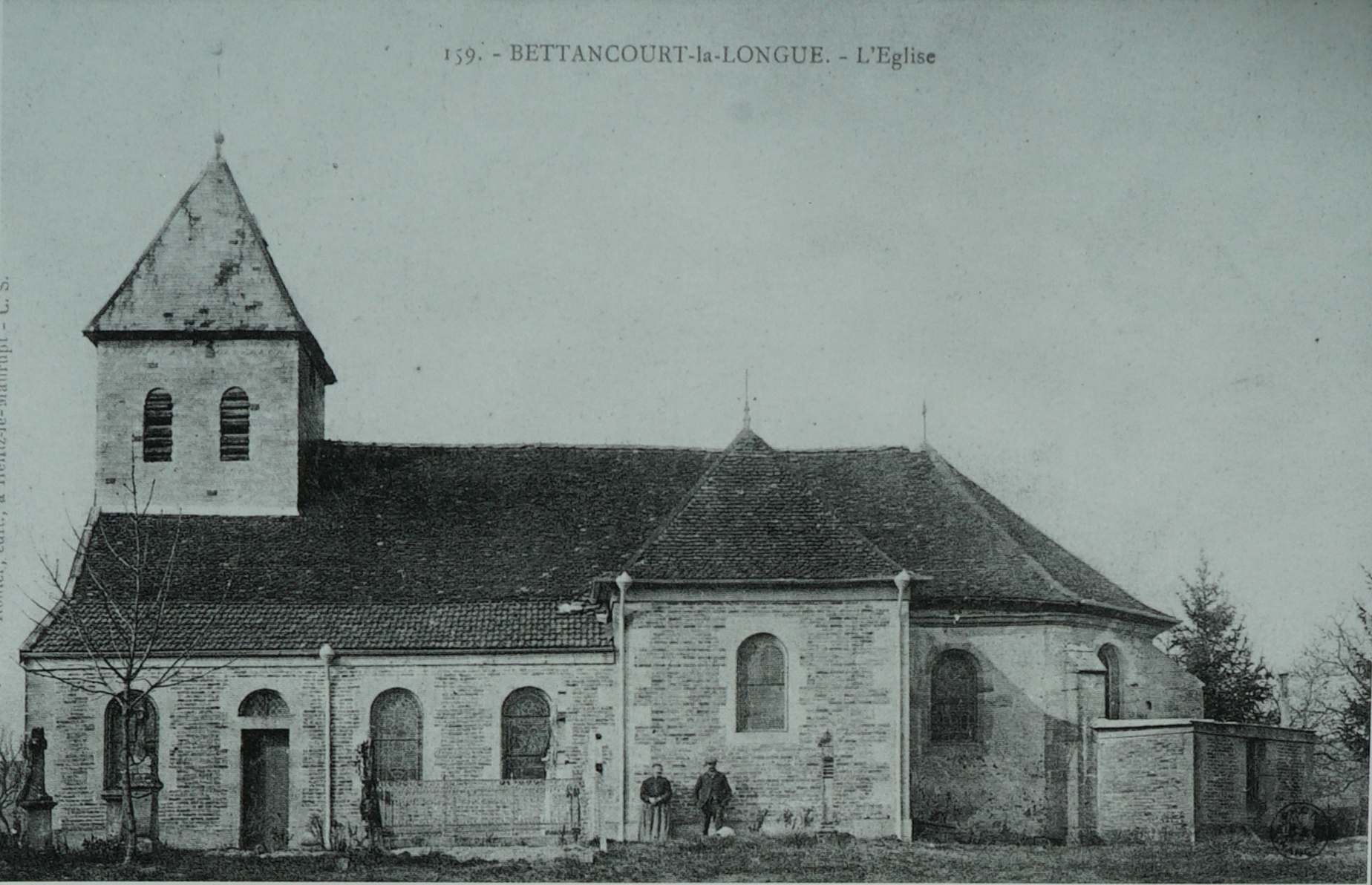 carte postale ancienne.